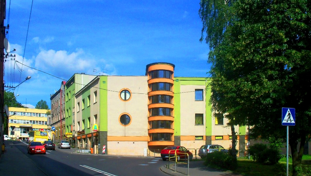 Budynek na rogu ulic Kazimiery Iłłakowiczówny i Słonecznej w Katowicach